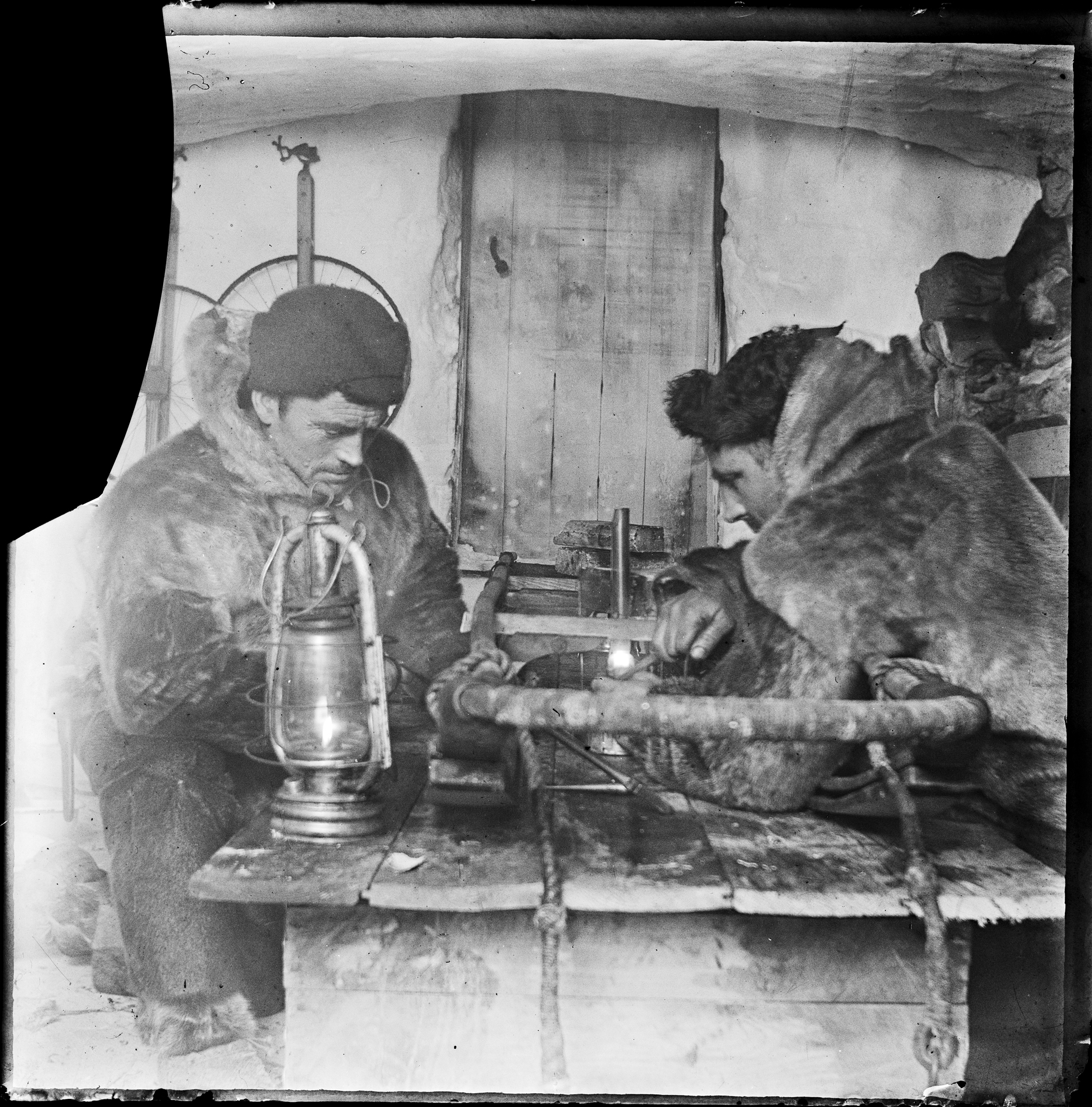 Tittel / Title: Helmer Hanssen og Oscar Wisting i "Intendanturen" som arbeidsrommet deres ble kalt Motiv / Motif: Negativ glassplate. Det var et av de mange rommene som ble gravd ut av snøen rundt Framheim. Rommet ble brukt som verksted og lager for utstyr. Dato / Date: 1911 Fotograf / Photographer: ukjent / unknown Sted / Place: Antarktis, Hvalbukta, Framheim Eier / Owner Institution: Nasjonalbiblioteket / National Library of Norway Lenke / Link: Bildesignatur / Image Number: bldsa_NPRA1101